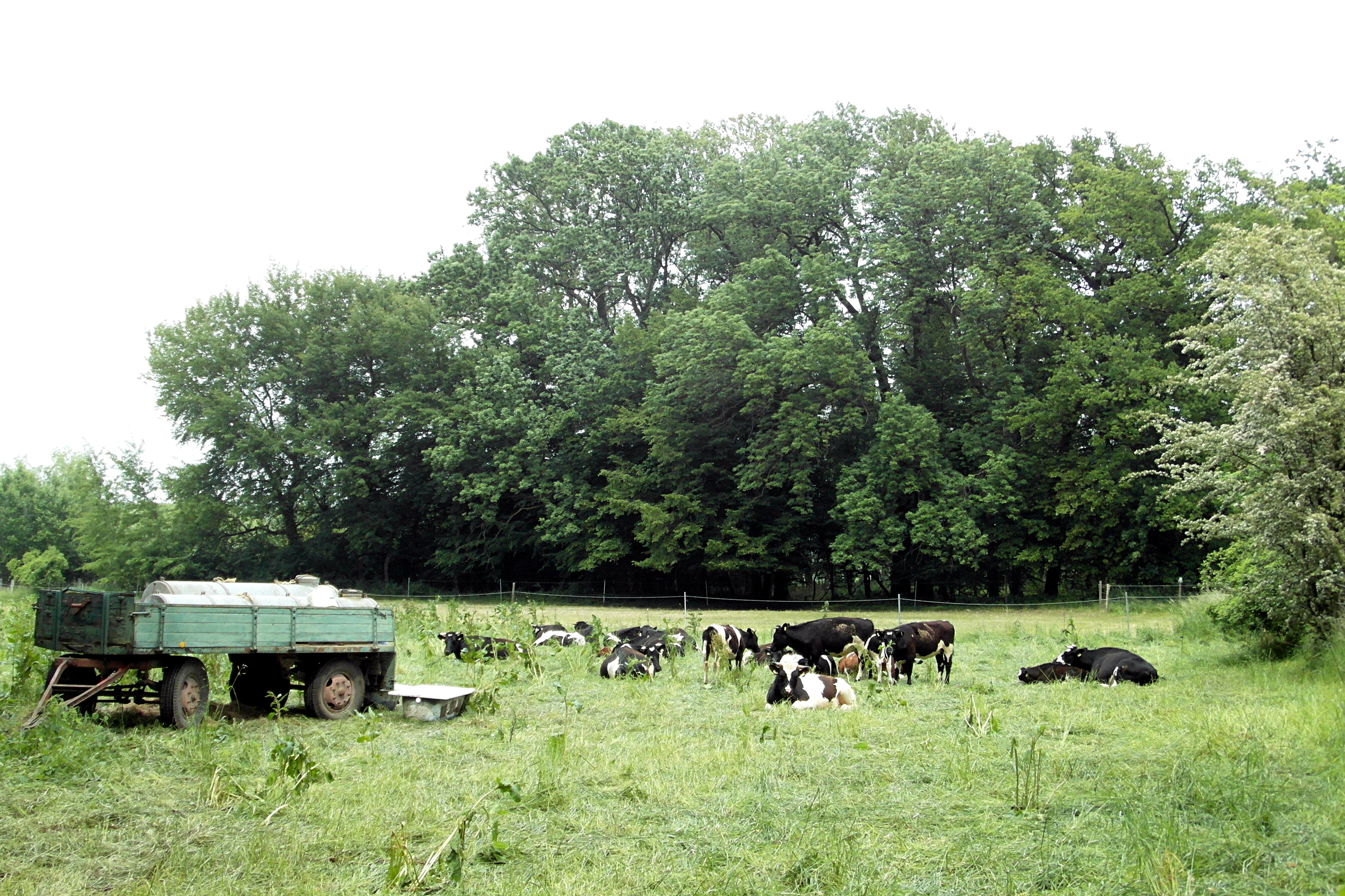 Landwirtschaft im Stadtgebiet von Hannover. Weide an der Lenther Chaussee zwischen Benther Berg und Badenstedt im Landschaftsschutzgebiet LSG H-S 00006 Benther Berg Vorland/Fössetal